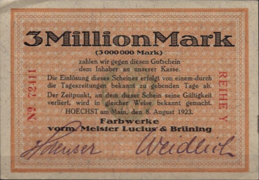 Notgeldschein drei Millionen Mark, 1923